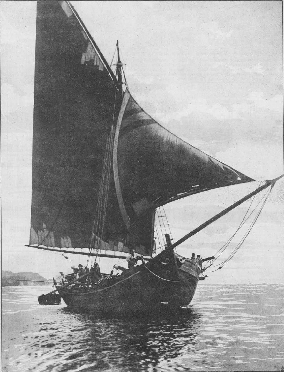 Naši jadranski ribiči.